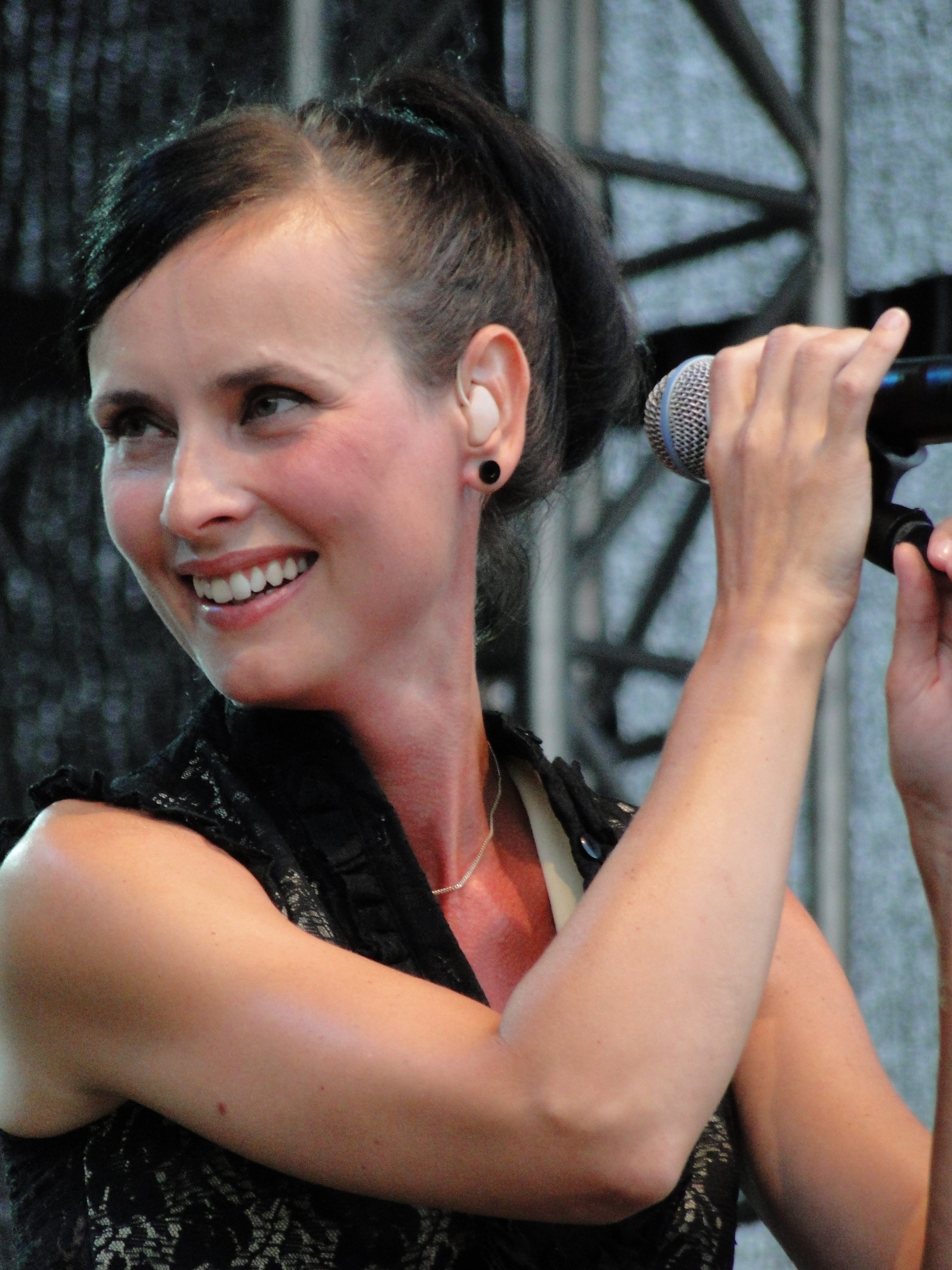 Frontfrau der Band Bell, Book & Candle, Jana Groß, bei einem Konzert 2010